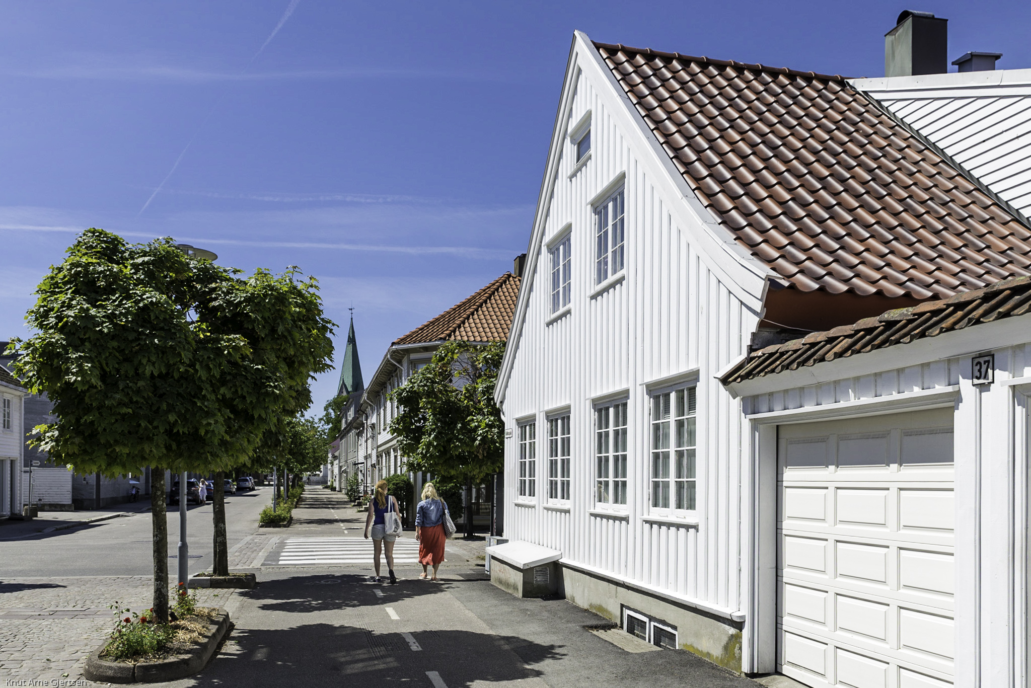 Posebyen i Kristiansand